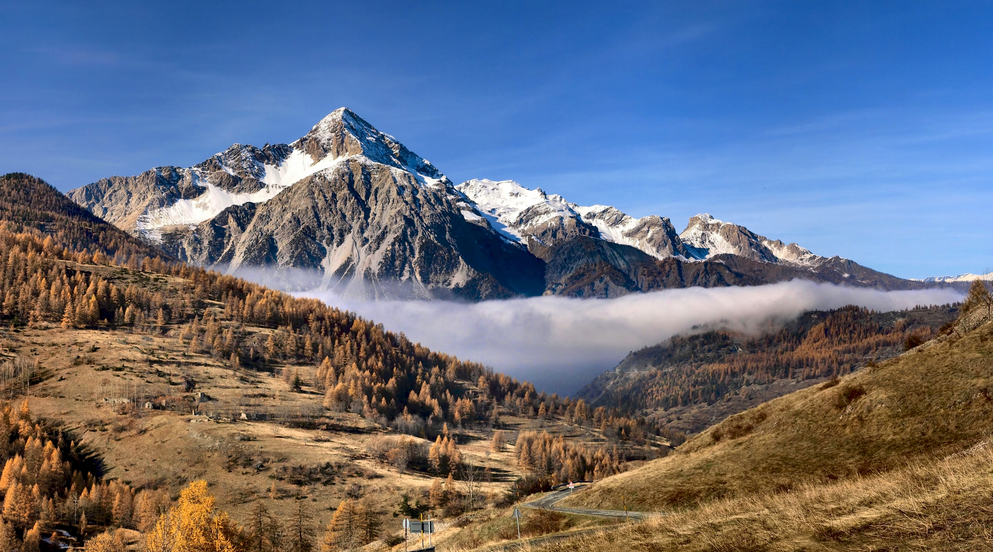 Pendici del Monte Chaberton (Q49964134)